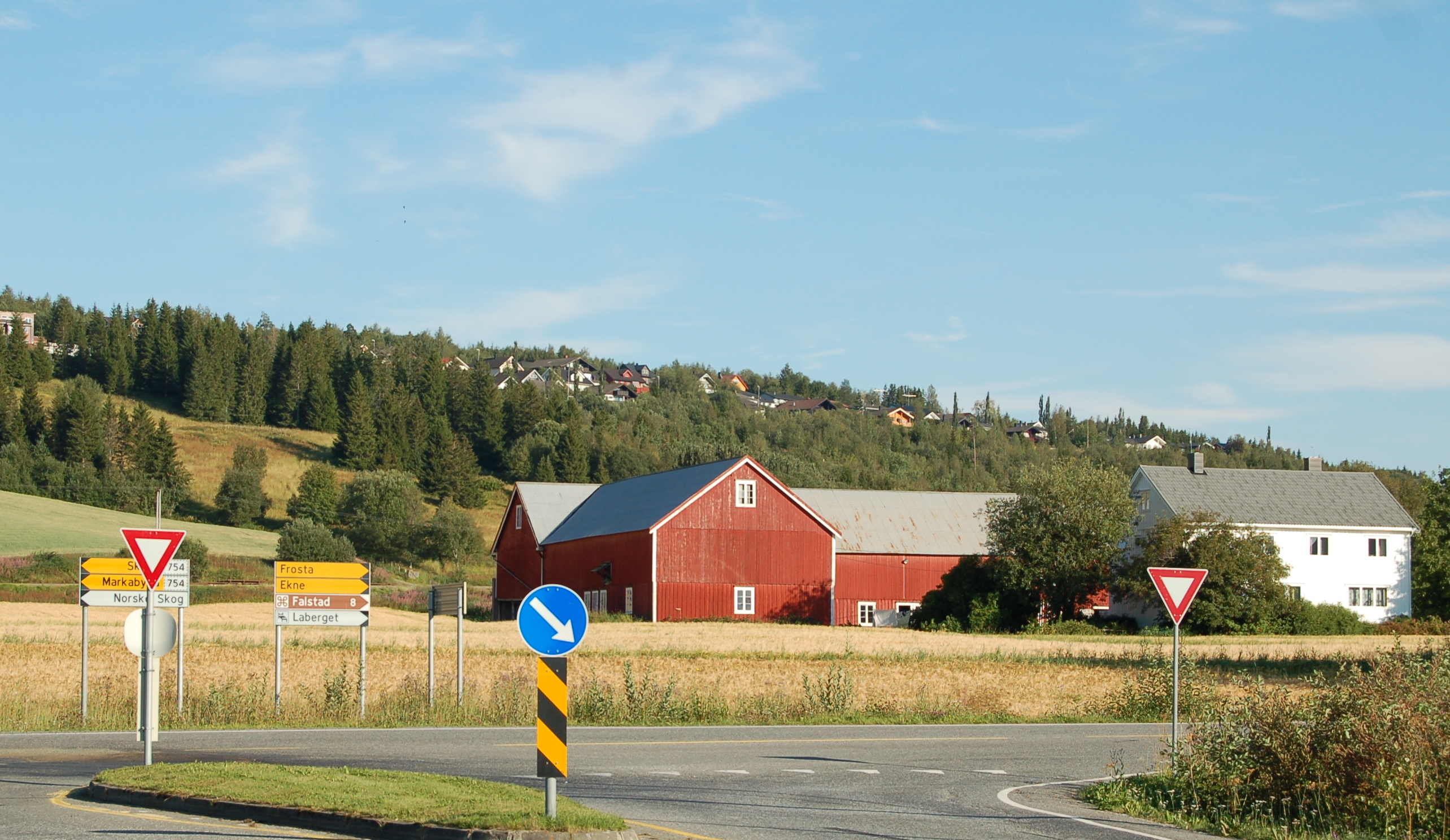 Holberg gård i Skogn